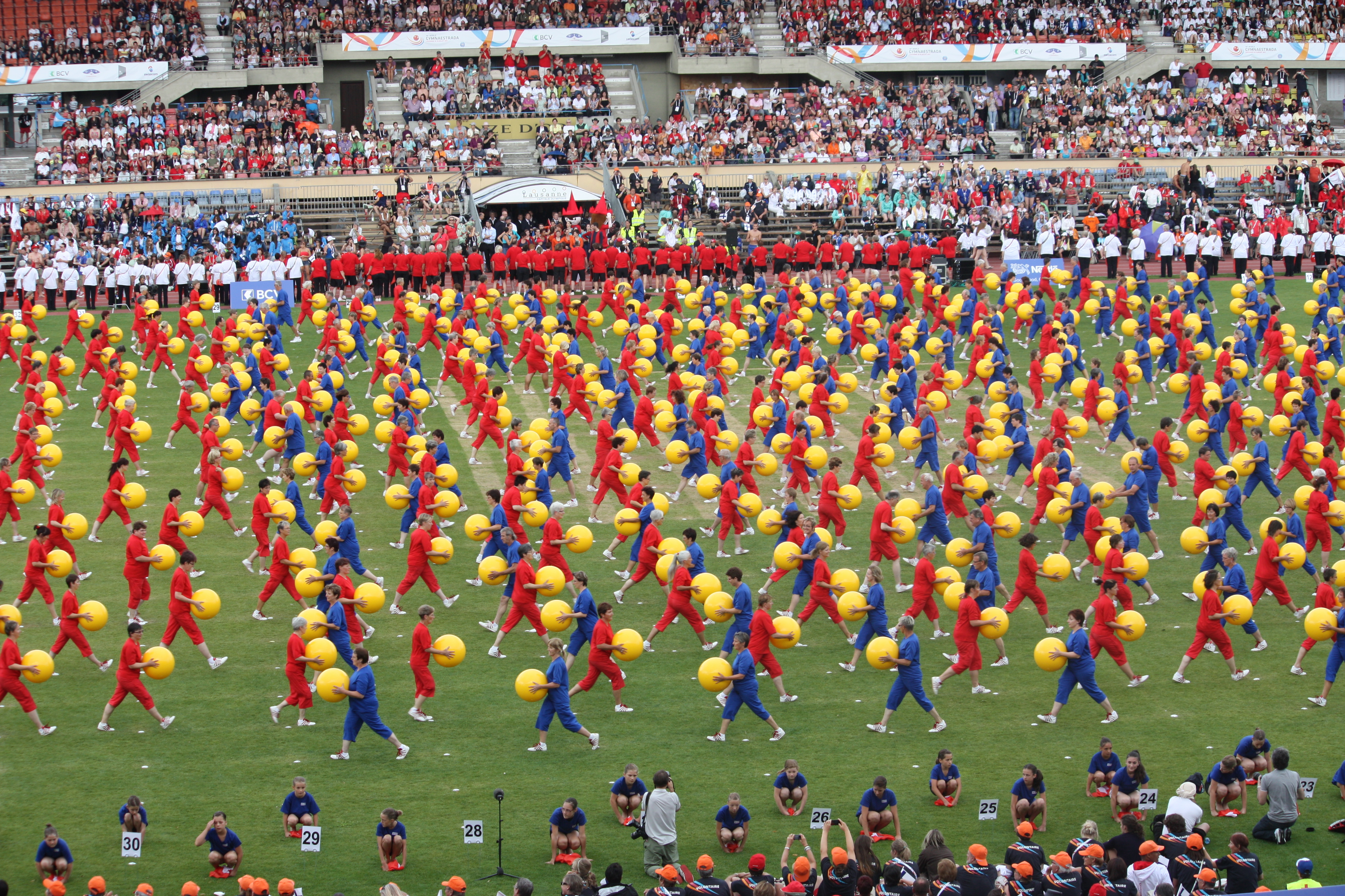 Gymnaestrada - gymnastes de grand groupe lors d'une représentation